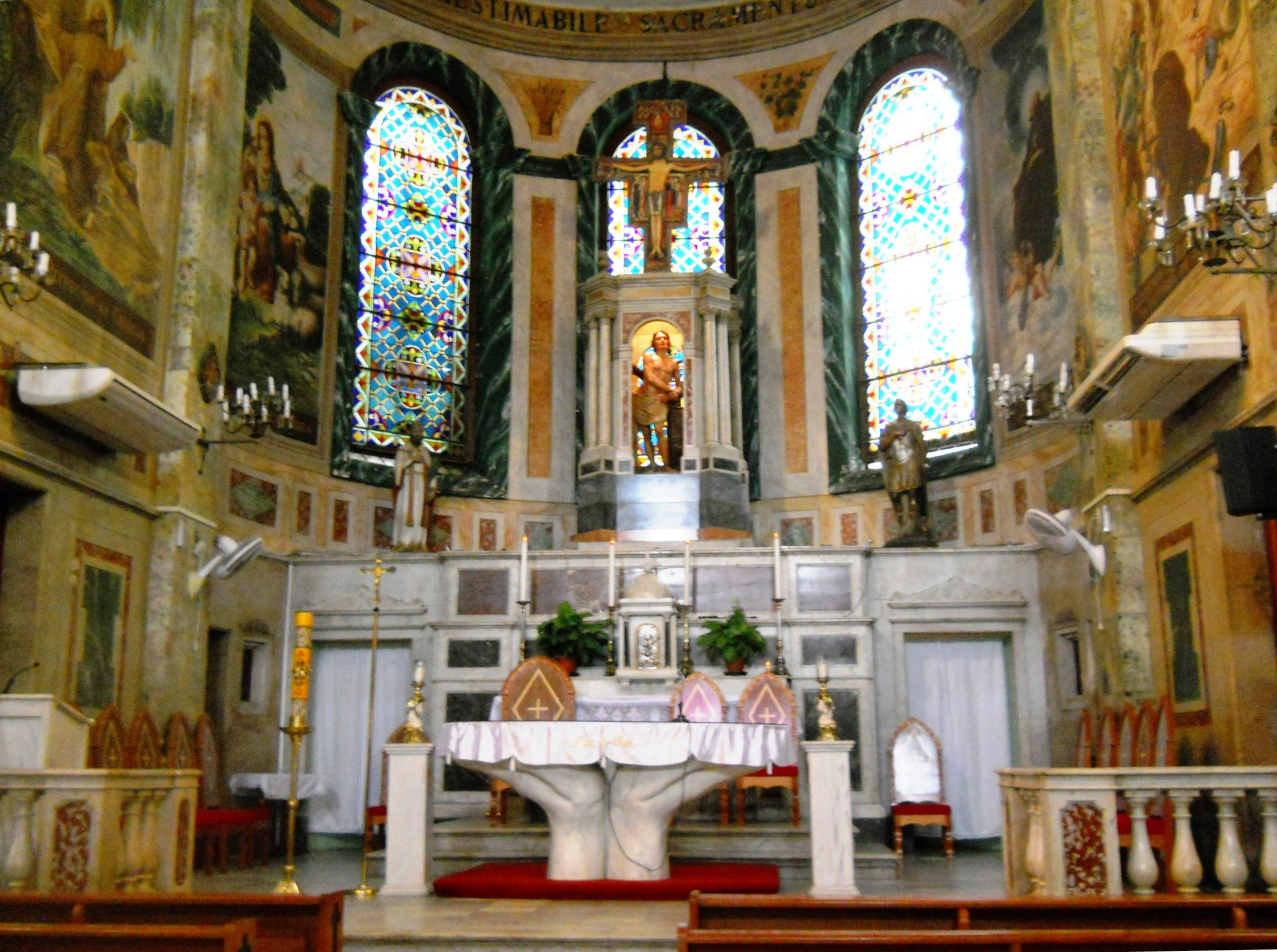 Centro Histórico de Manaus